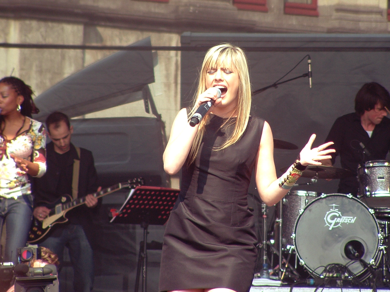 Margot De Ridder tijdens Flikken Adieu op 18 april 2009 in Gent (België).